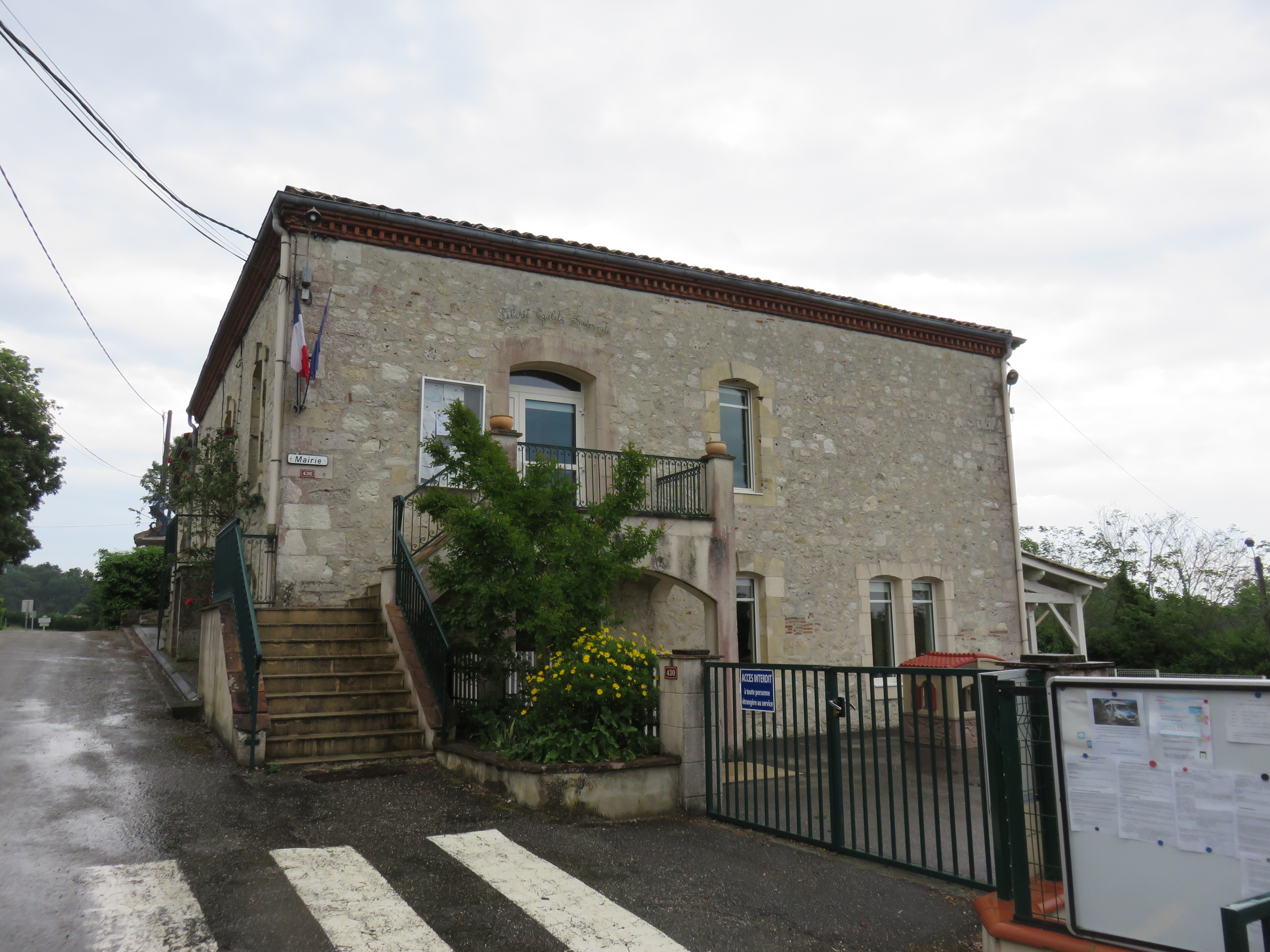 Mairie de Saint-Romain-le-Noble (Lot-et-Garonne, France).